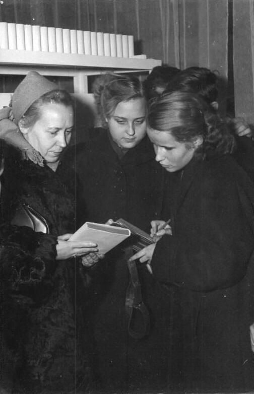 Zentralbild-Funck, 21.11.1953 Zum Monat der Deutsch-Sowjetischen Freundschaft Schriftstellerbasar in Berlin. Am 21.11.1953 veranstalteten der Deutsche Schriftstellerverband und die Sektion Literatur der Gesellschaft für Deutsch-Sowjetische Freundschaft im Berolinahaus am Alexanderplatz einen Schriftsteller-Bazar. Zu Ehren des Monats der Deutsch-Sowjetischen Freundschaft verkauften bekannte deutsche Schriftsteller Bücher ihrer sowjetischen Kollegen. UBz: Die Schriftstellerin Elfriede Brüning unterhält sich mit Elfriede Hannemann (rechts) von der Händel-Schule in Friedrichshagen.